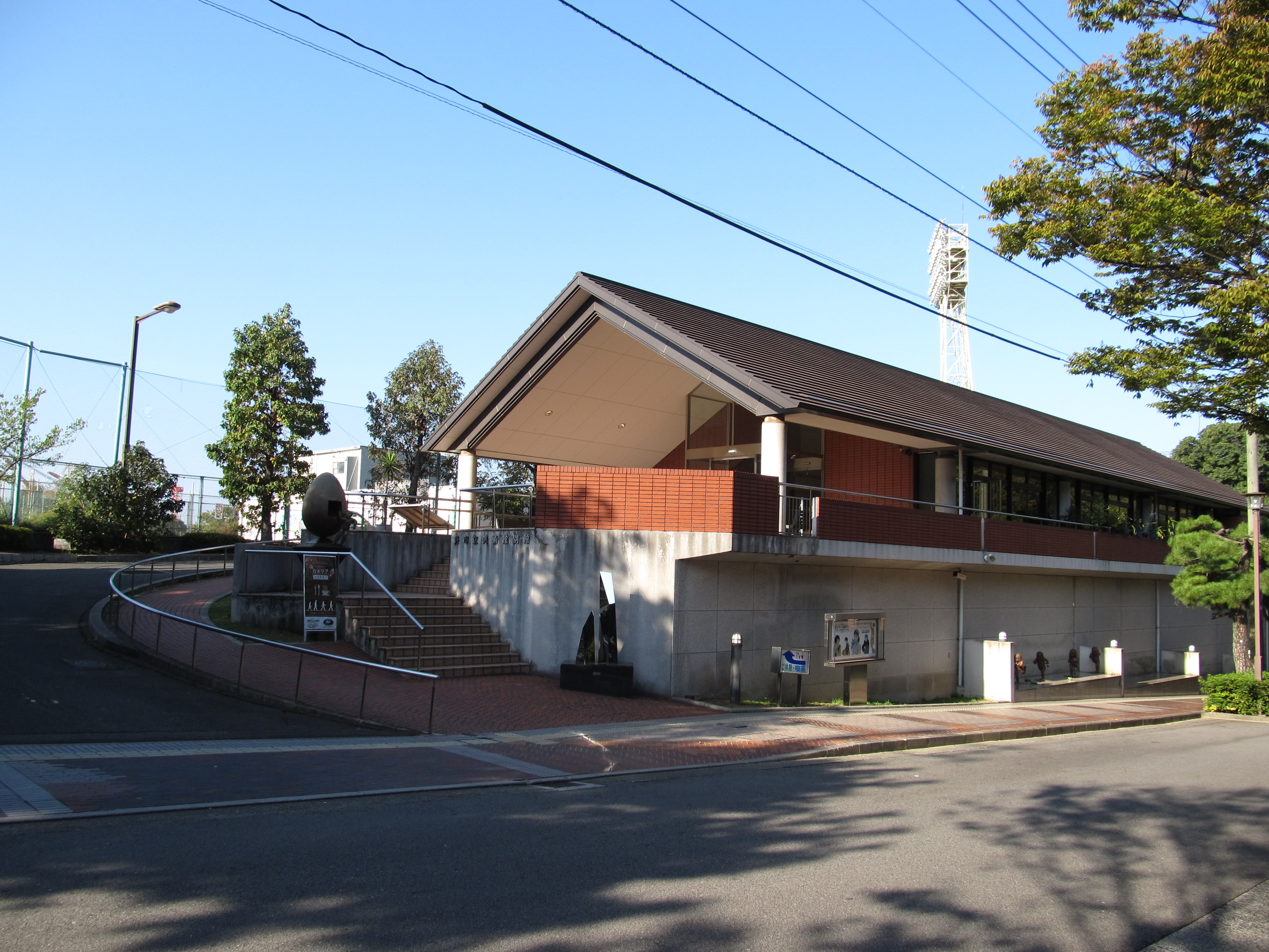 広島県呉市幸町の入船山公園内にある呉市立美術館の別館。